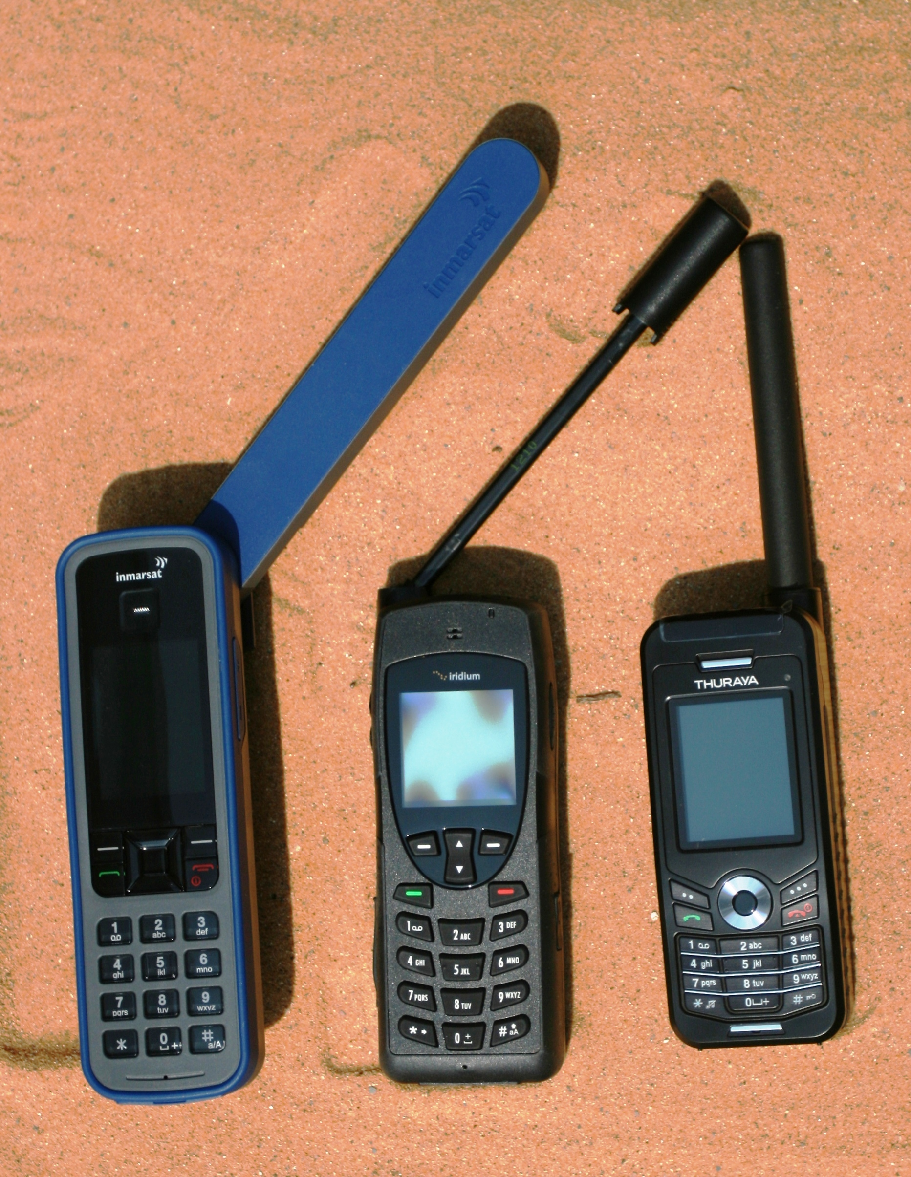 Größenvergleich der Satellitentelefone "IsatPhone Pro" des SAtelliten-Netzbetreibers INMARSAT, "Iridium 9555" des Netzbetreibers IRIDIUM und "Thuraya XT" des Netzbetreibers THURAYA.